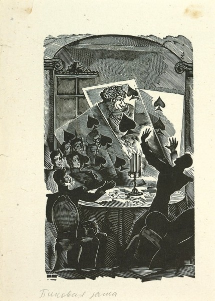 КРАВЧЕНКО, АЛЕКСЕЙ ИЛЬИЧ. Иллюстрация к повести А.С. Пушкина «Пиковая дама». 1937-1940 гг. Ксилография.